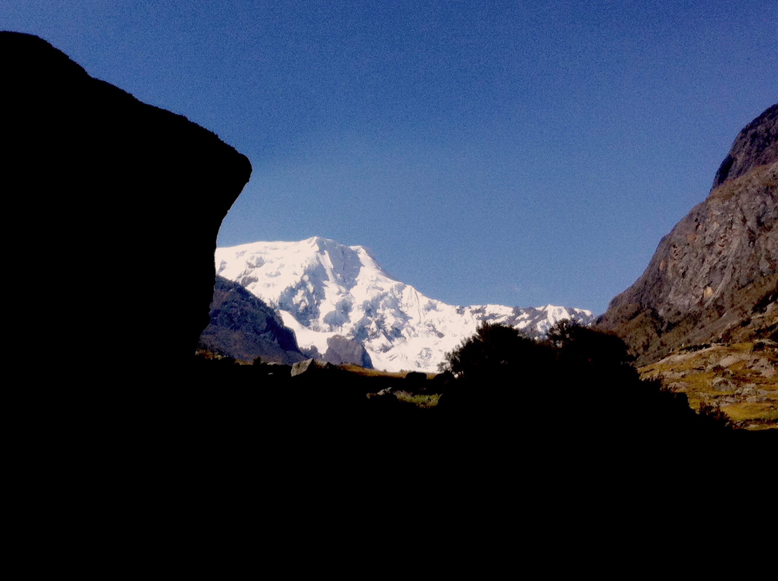 Foto tomada en la Quebrada Rurec dentro del Parque Nacional Huascarán a inicios de agosto de 2019, Áncash - Perú.